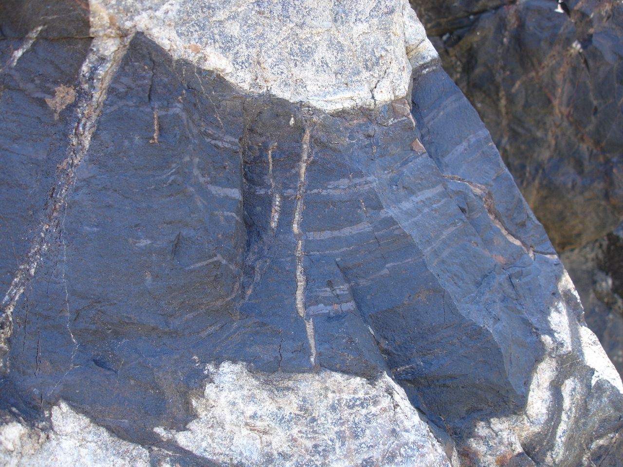 Wawaの縞状鉄鉱層の露頭